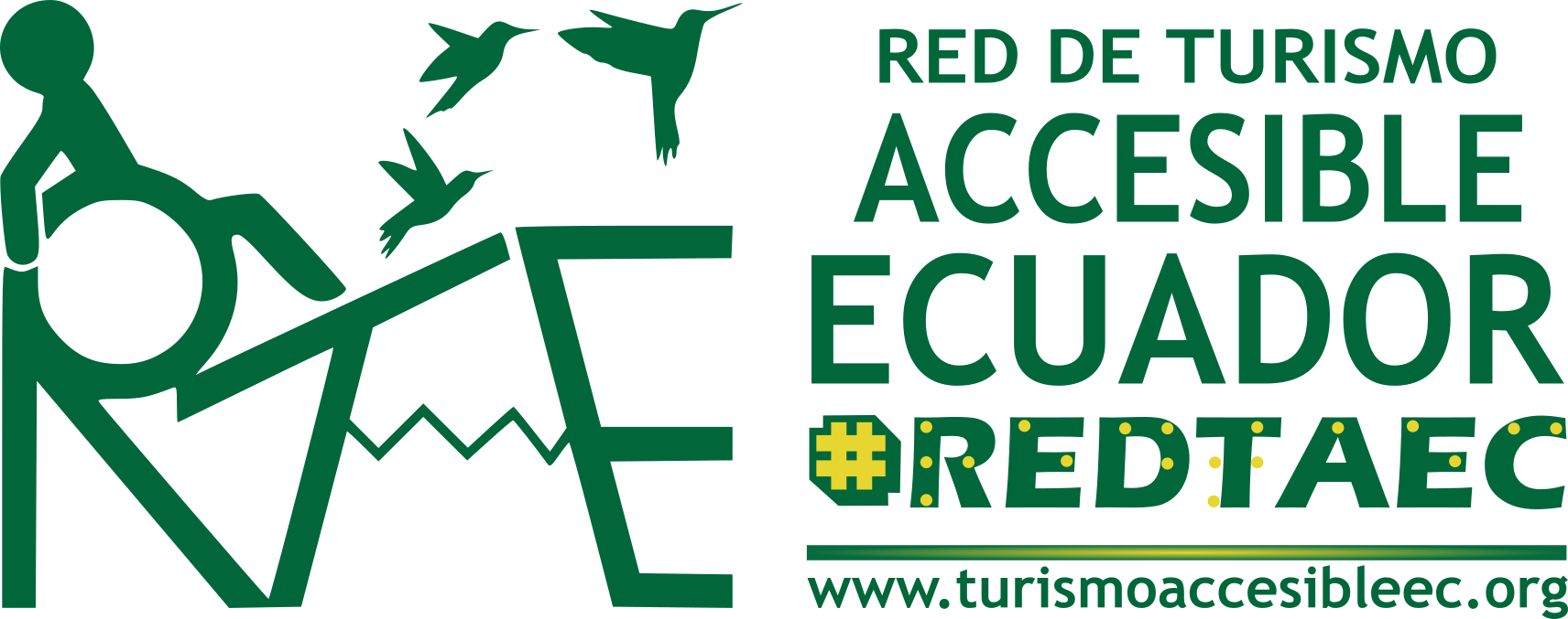 Logo rectangular de REDTAEC en donde se coloca el ícono de la compañía, este comprende las siglas de la empresa y una persona en silla de ruedas que usa esas letras como rampa para avanzar, junto a los tres colibríes que le acompañan.